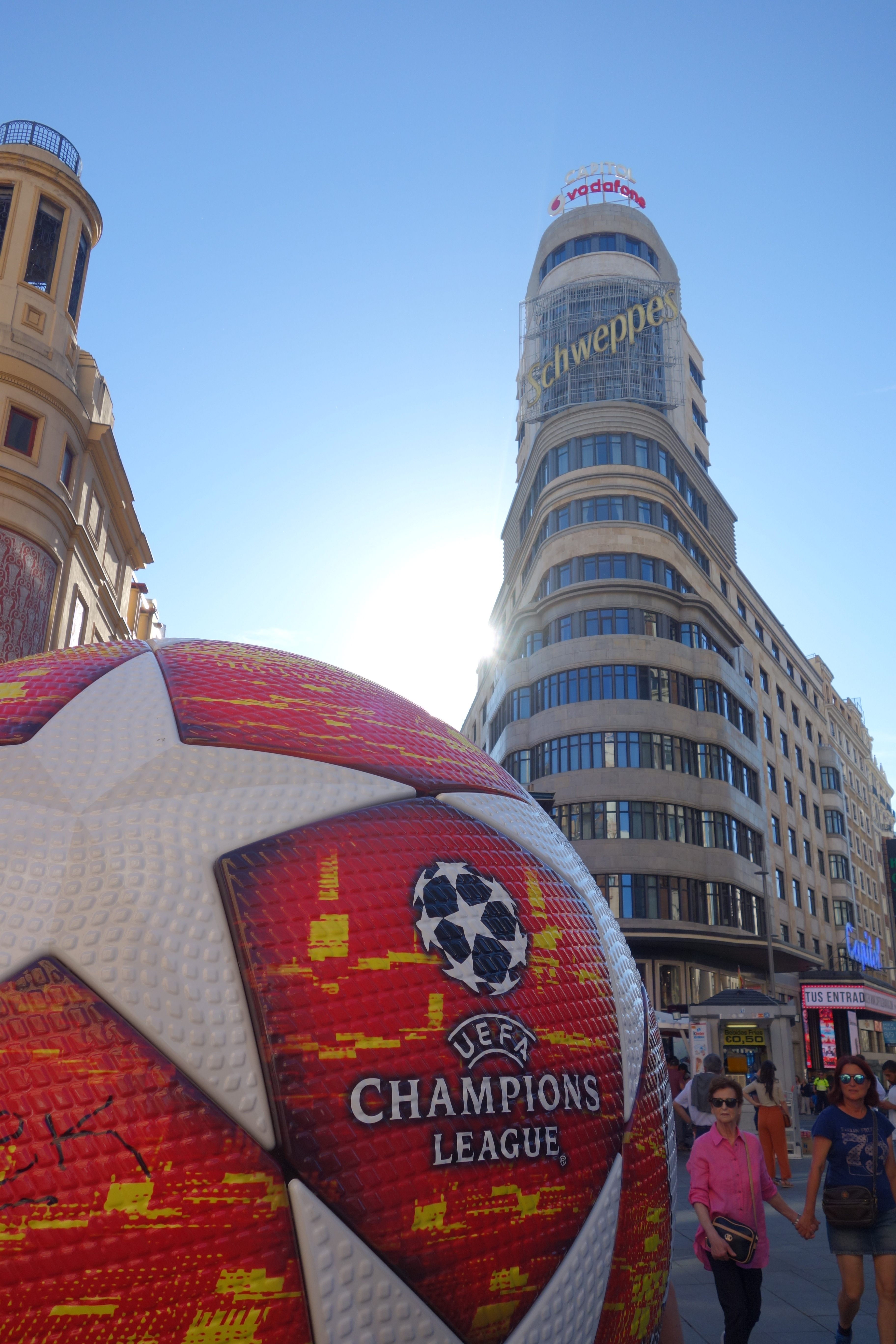 Plaza del Callao com decoração referente à final da Champions League de 2019.